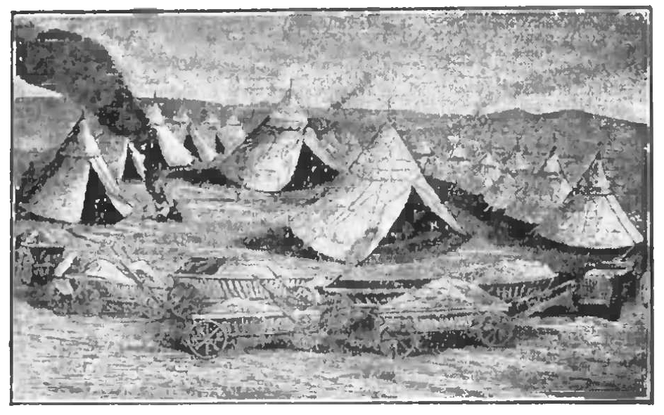 Козацький табор.